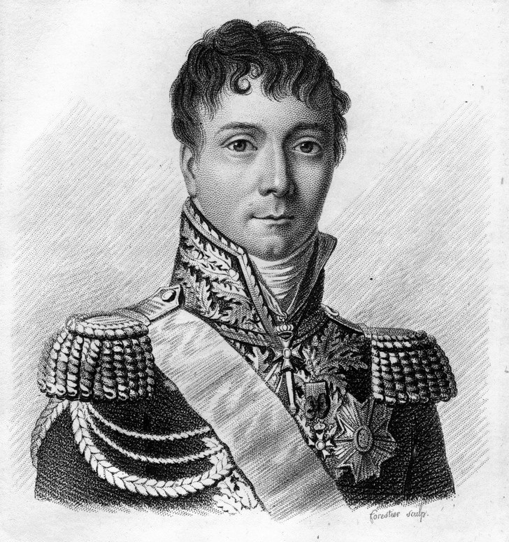 Général_Charles_Etienne_Gudin_de_la_Sablonnière